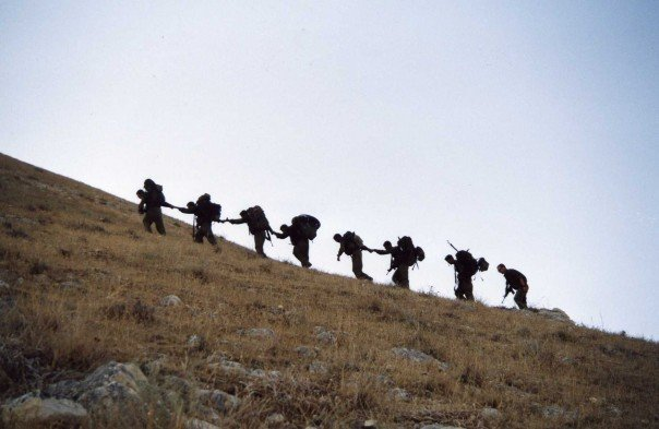 פלס"ר 401 בתרגיל 2014